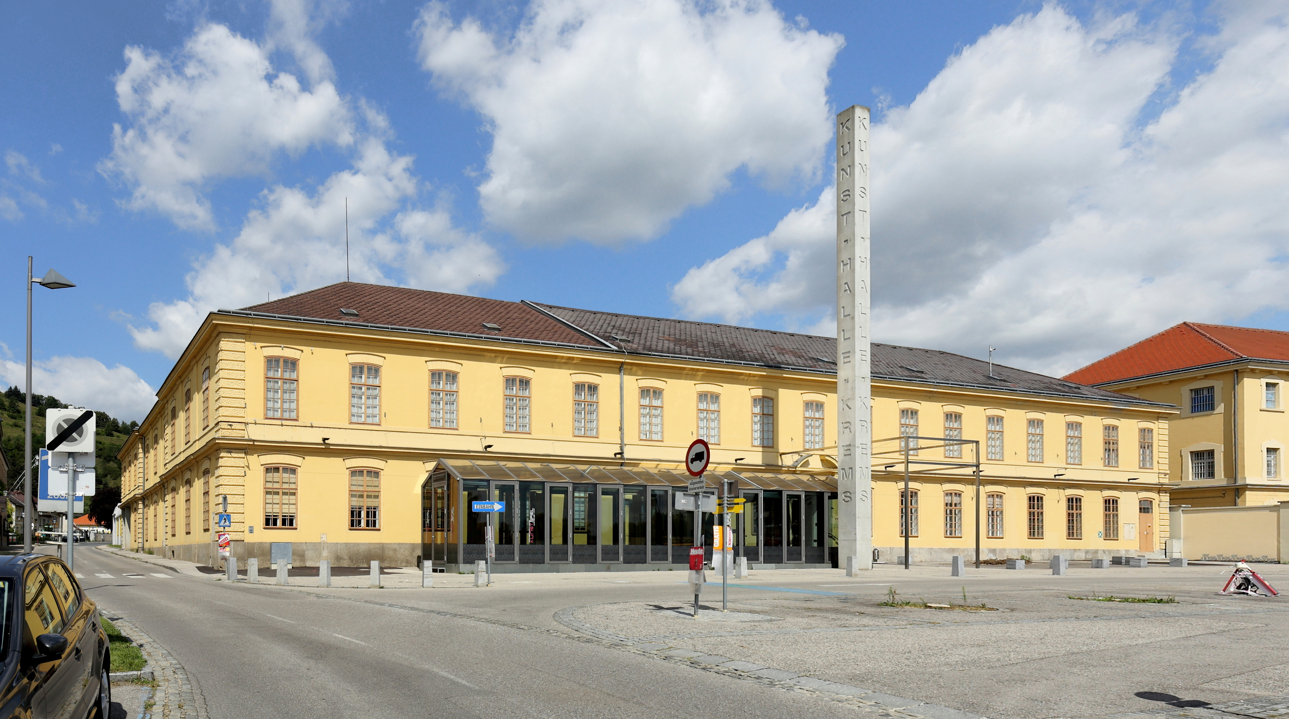 Die Kunsthalle Krems in Stein an der Donau, ein Ortsteil der niederösterreichischen Stadt Krems.1850 wurde aufgrund der guten Verkehrslage an der Donau und der Nähe zu Wien die Zigarrenfabrik Stein zur Produktion von Virginier-Zigarren errichtet. Zu diesem Zwecke wurde ein Gasthof angekauft und von Adalbert Wohlschläger umgebaut, beziehungsweise das zweigeschossige Hauptgebäude mit hakenförmigen Grundriß errichtet. Nach dem Neubau der Fabrik in der Dr.-Karl-Dorrek-Straße von 1918 bis 1922 diente es als Rohstofflager. Später wurde es von der Firma Eybl genutzt. Von 1994 bis 1995 erfolgte durch Architekt Adolf Krischanitz ein Umbau zu einer Ausstellungshalle mit rd. 1400 m2 Ausstellungsfläche. Am 31. März 1995 fand mit der Ausstellung „Wasser und Wein“ die Eröffnung der Kunsthalle Krems statt.